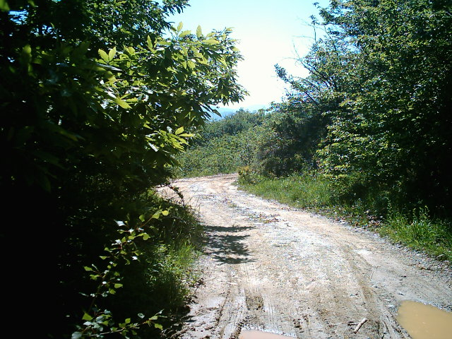 strada sterrata su terreno montuoso, presso monte Colma (AL) - Italia